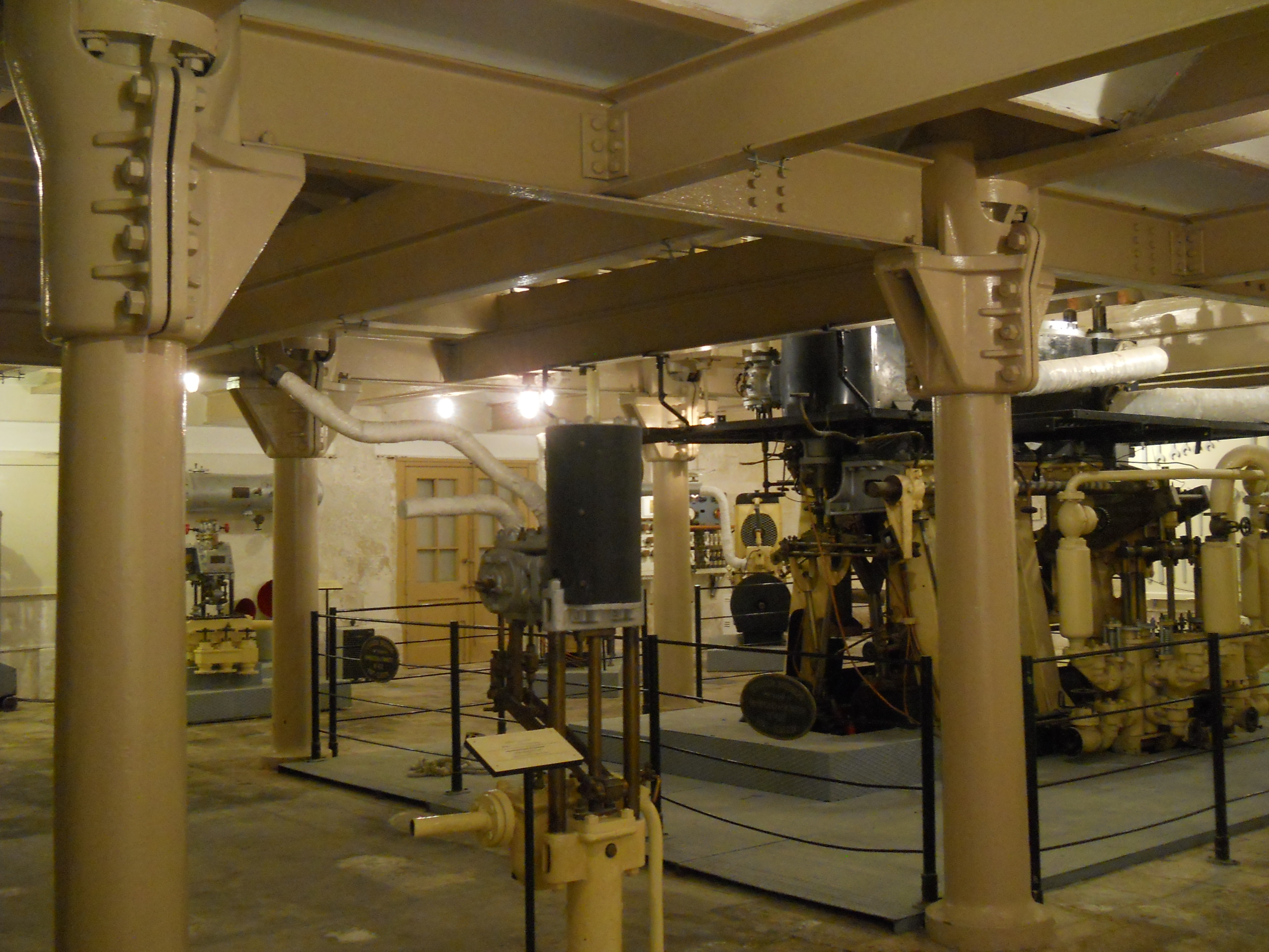 Die Anadrian Halle, im früheren Mehlmühlen-Raum